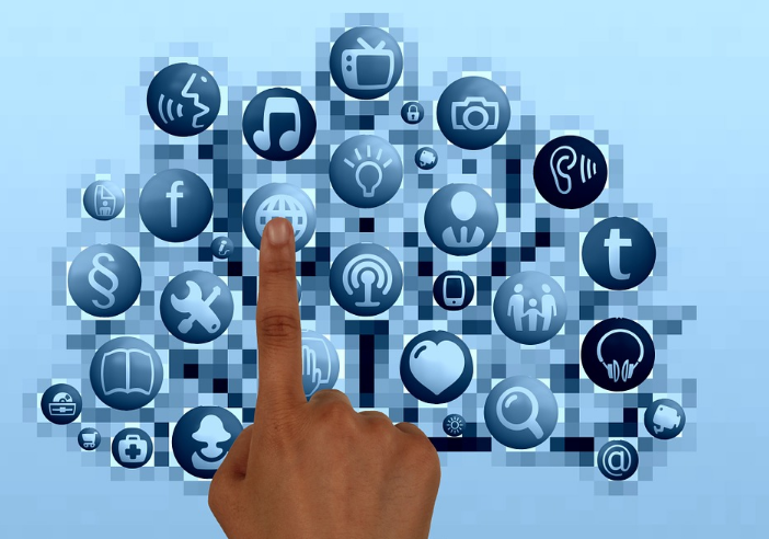 IMG sobre app